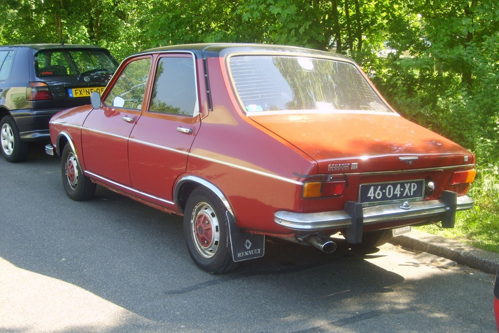 46-04-XP